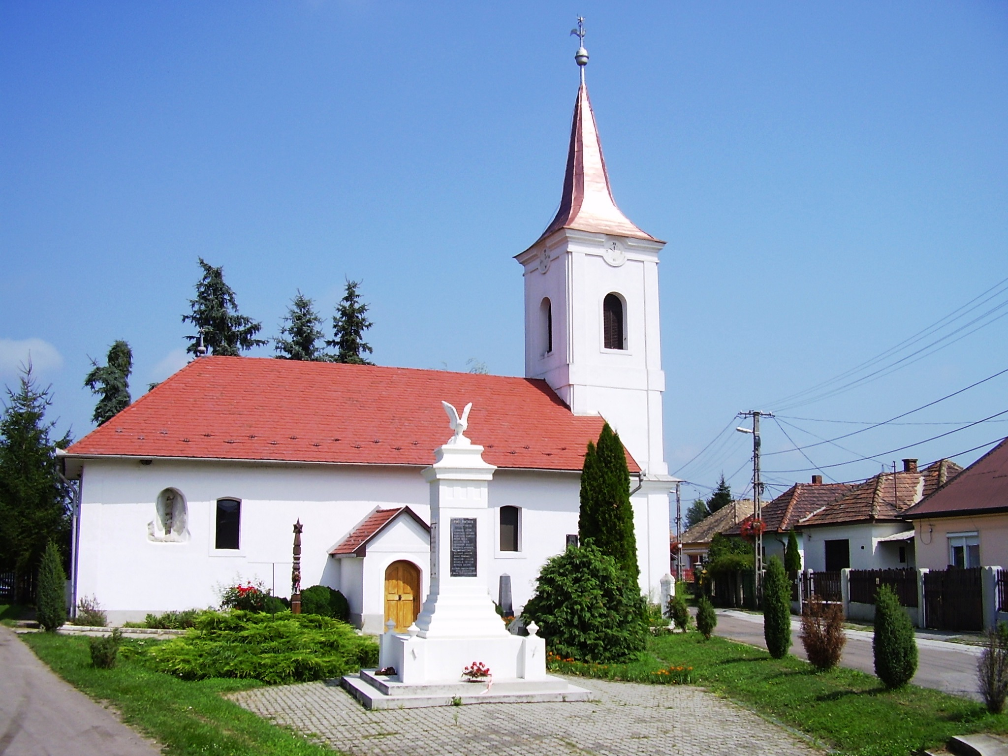 Reformed church in Kazincbarcika (Felsőbarcika)